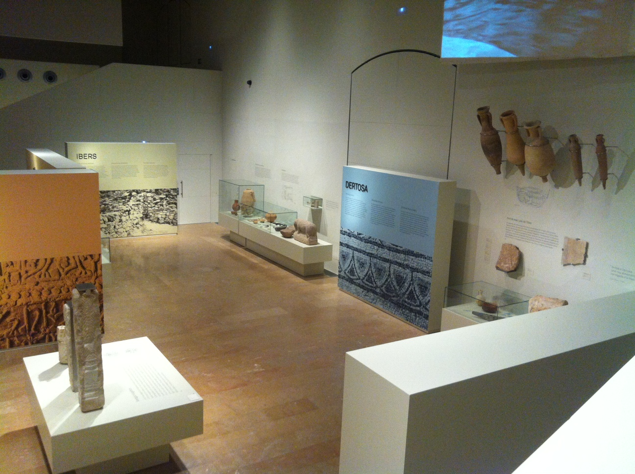 Museu de Tortosa - vista general de l'interior